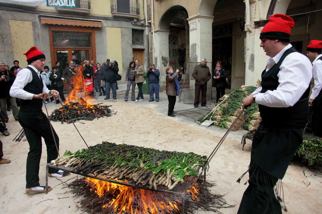 Gran Festa de la Calçotada de Valls / Spain, Catalonia